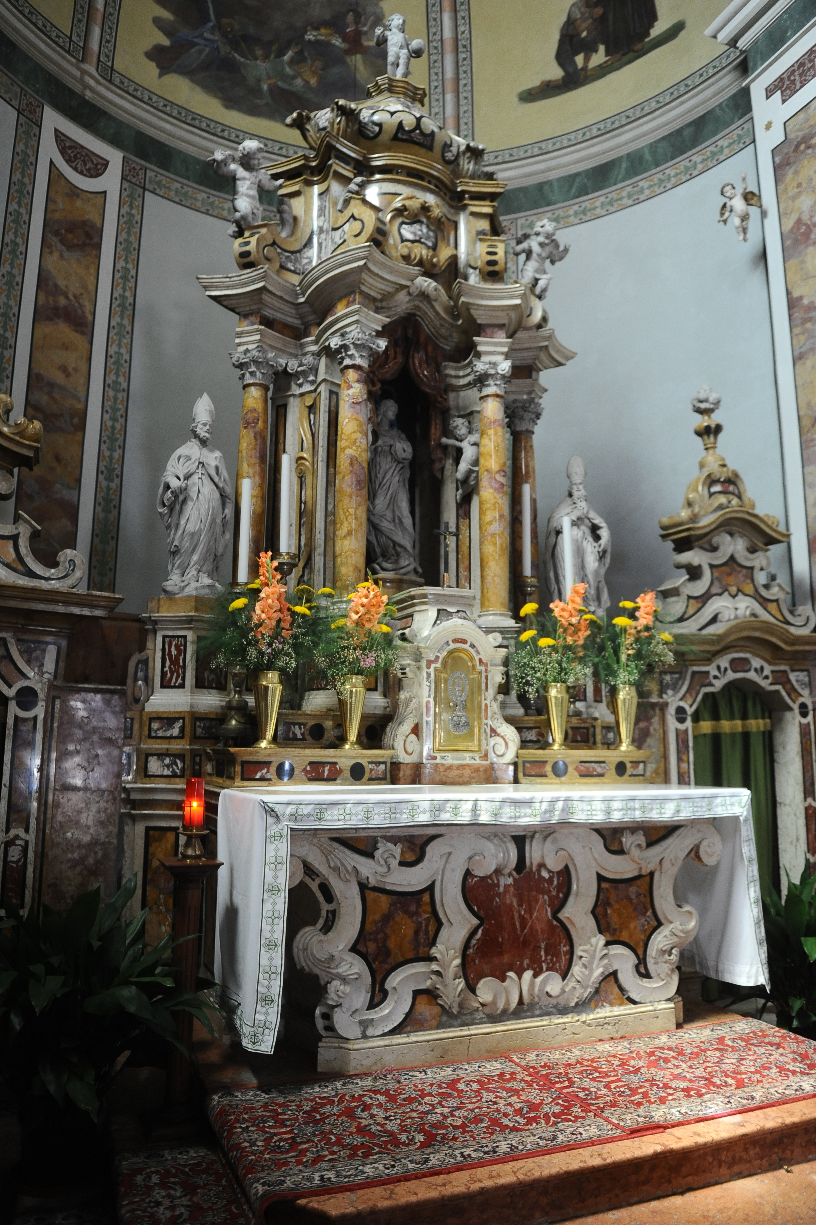 Chiesa di San Biagio a Lisignago. Altare.